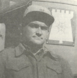 מאיר בץ - קצין ההנדסה של מחוז ירושלים 1948